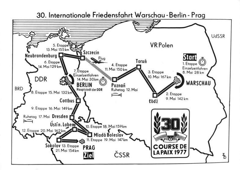 Friedensfahrt, Karte, Streckenführung ADN-ZB 9.2.77 Berlin: Die Streckenführung der 30.Internationalen Friedensfahrt Warschau-Berlin-Prag vom 8.-21.Mai 1977. Das Jubiläumsrennen führt in 13 Etappen über insgesamt 1704 Kilometer. Es wird am 7.Mai 1977 auf dem Altmarkt in Warschau feierlich eröffnet. Die Reise von Poznan nach Szozecin legen die Friedendsfahrer per Flugzeug zurück.